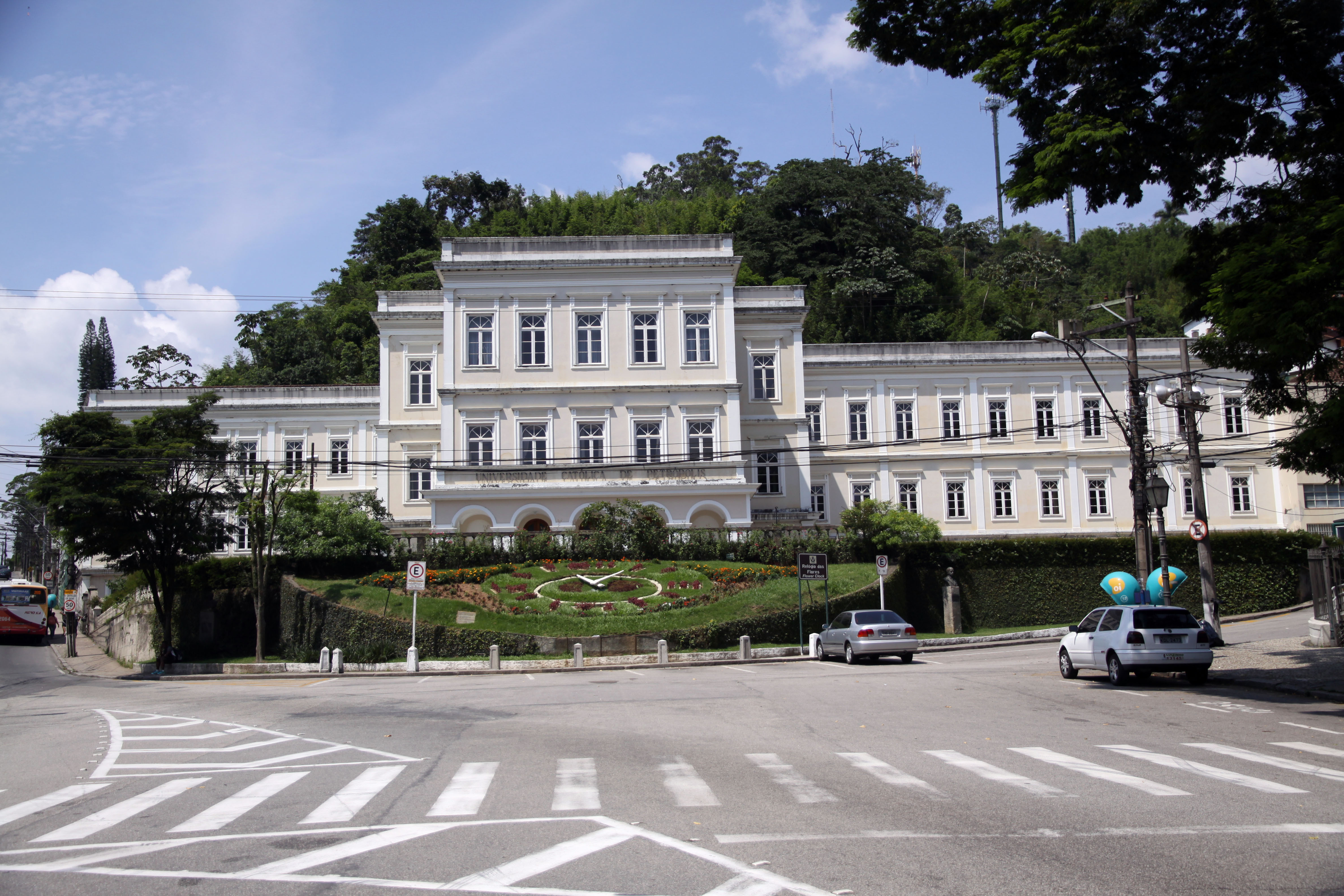 UCP - Universidade Católica de Petrópolis